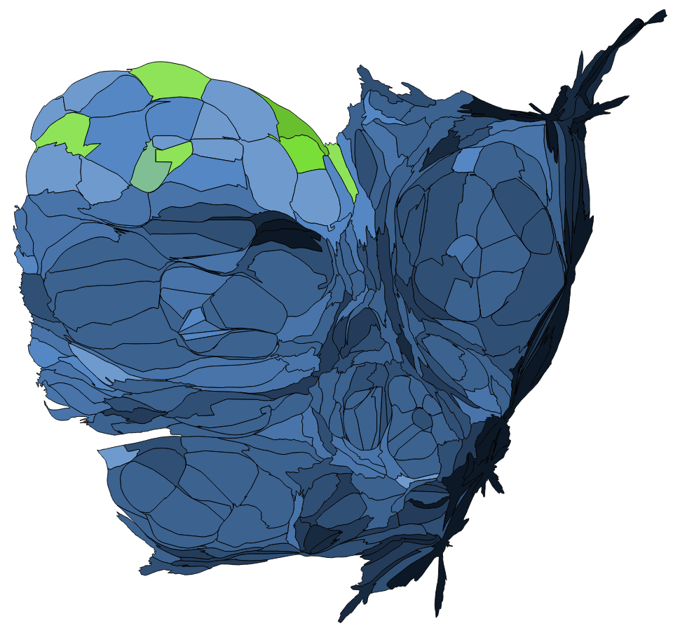 顏色對照表